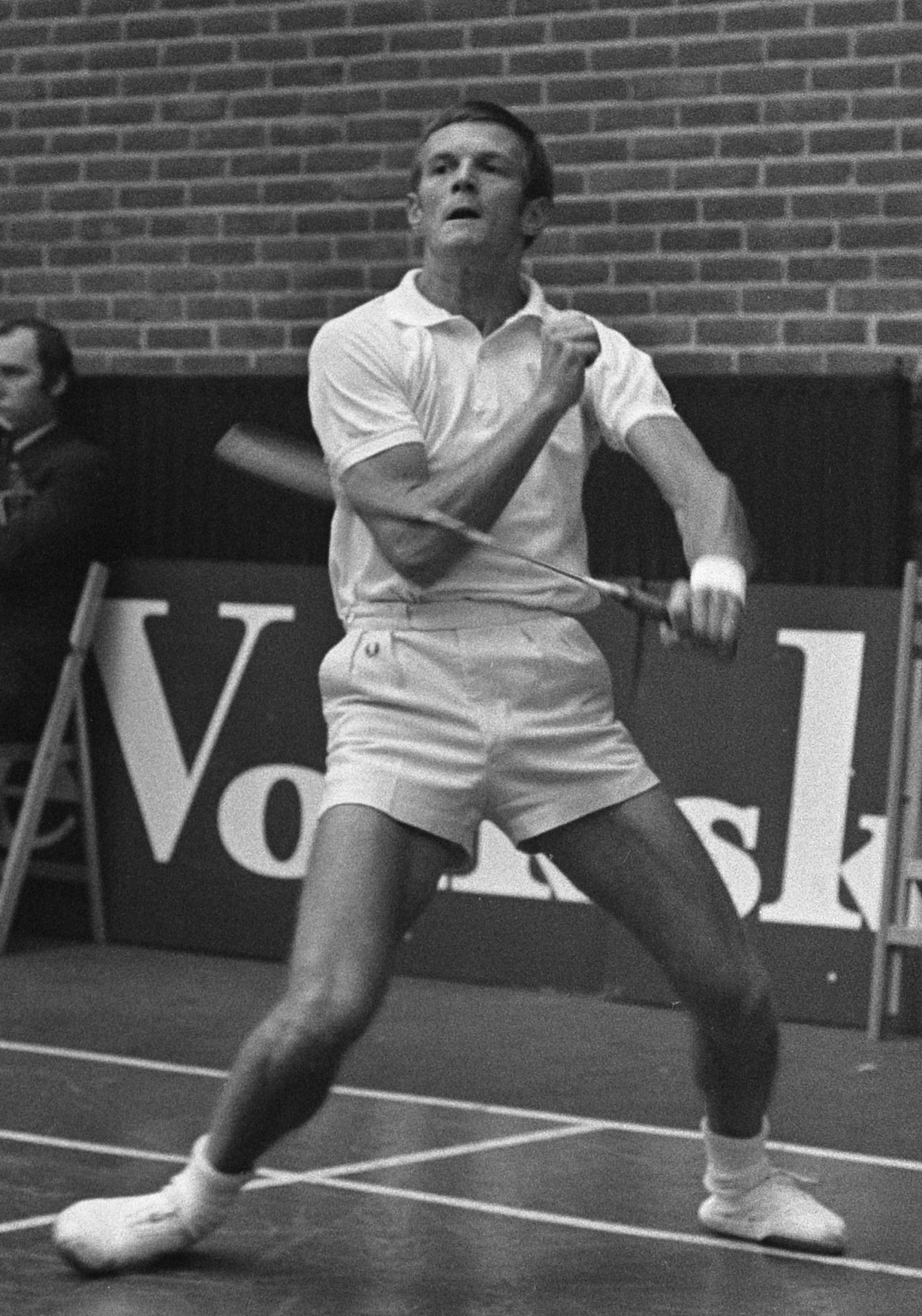 Elo Hansen